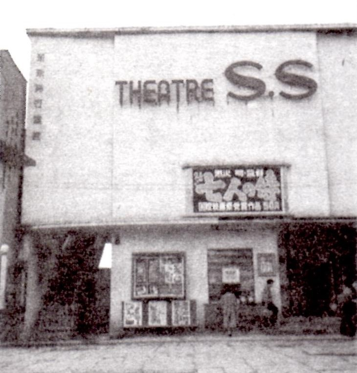 東京都渋谷区の映画館「テアトルSS」。